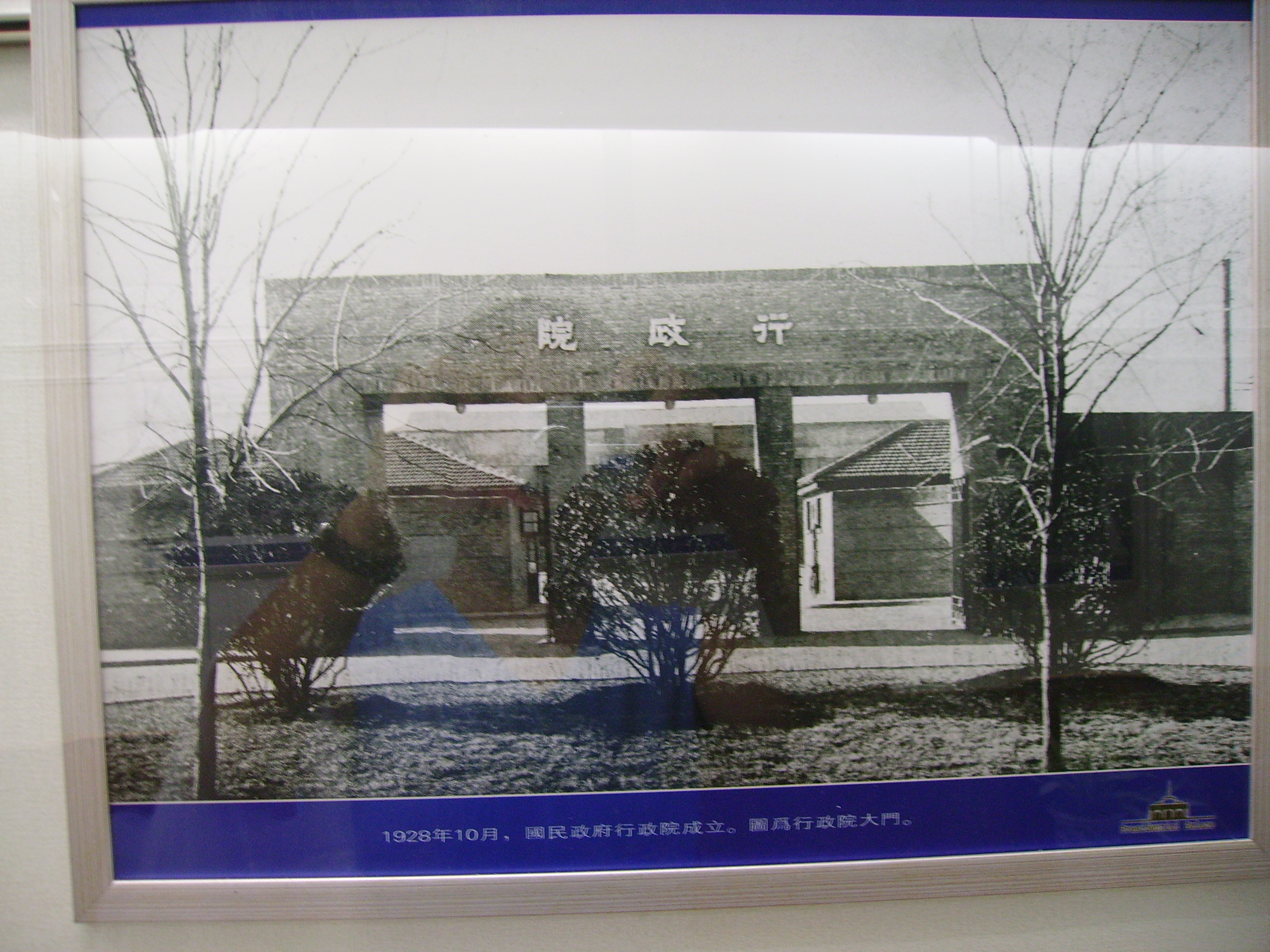 Roc in China gov. zn:行政院